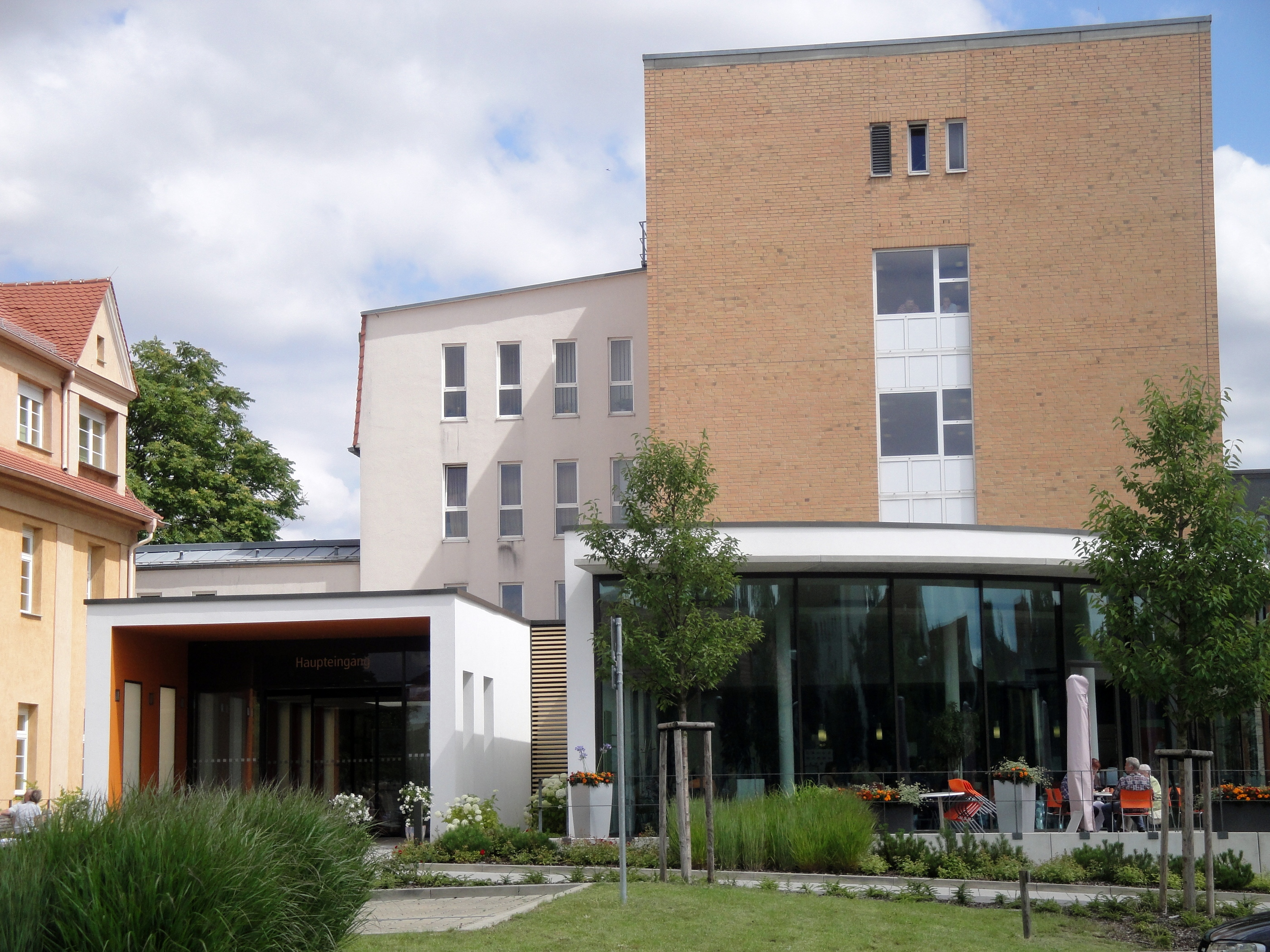 Saale-Unstrut Klinikum Naumburg, Klinikum Burgenlandkreis, Naumburg (Saale)